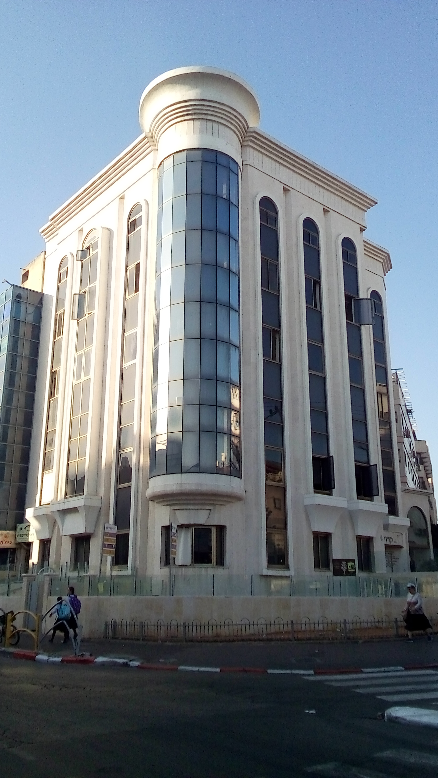 בית הכנסת "קדושי קראקא" בני ברק